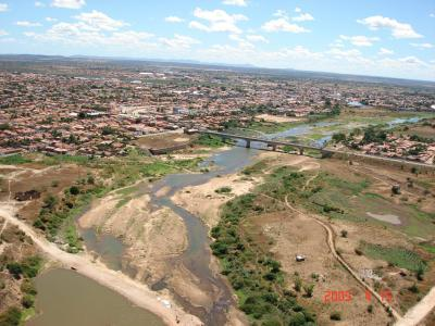 Alto do Juca, Iguatu - CE, Brazil